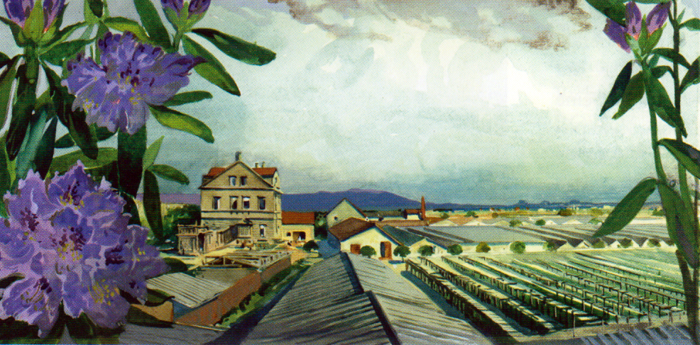 Seidelsche Gärtnerei in Strießen